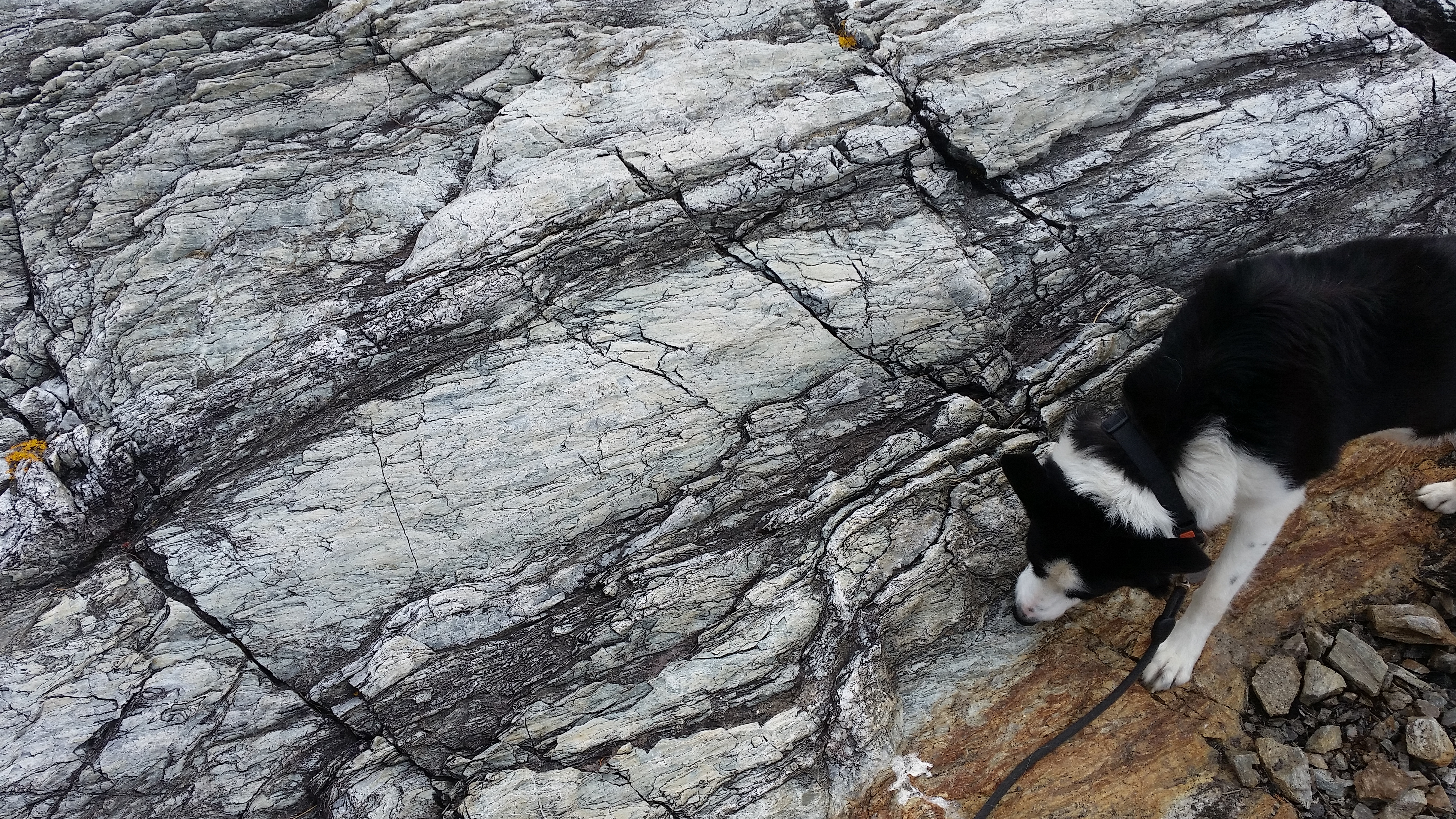 Chert fra Nautøy (Stord Kommune)